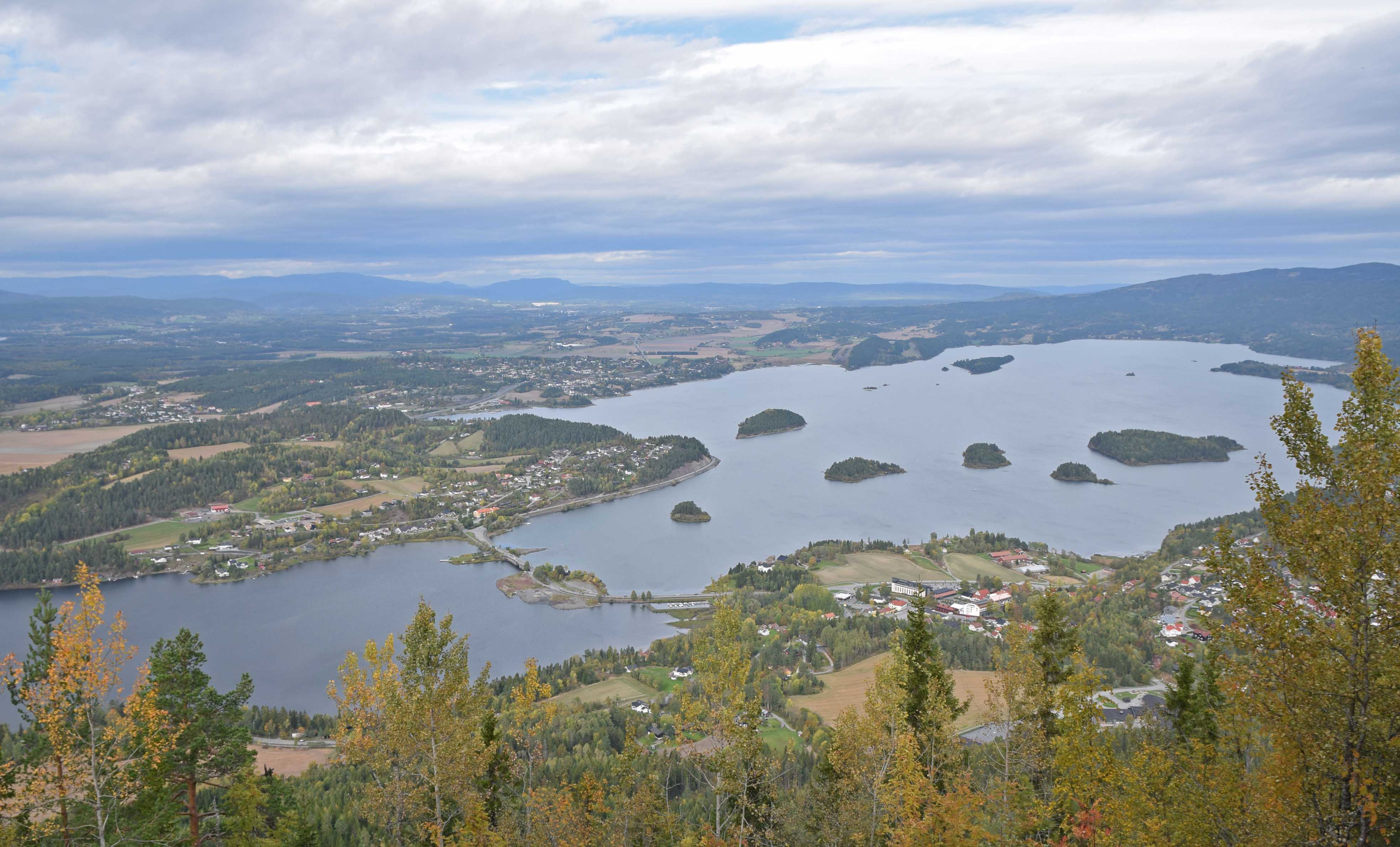 Steinsfjorden, Sundvollen til høyre for broen